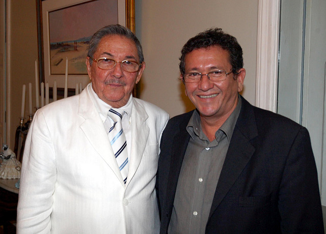 Presidente de Cuba, Raúl Castro, encontra-se com prefeito de Camaçari, Luiz Carlos Caetano